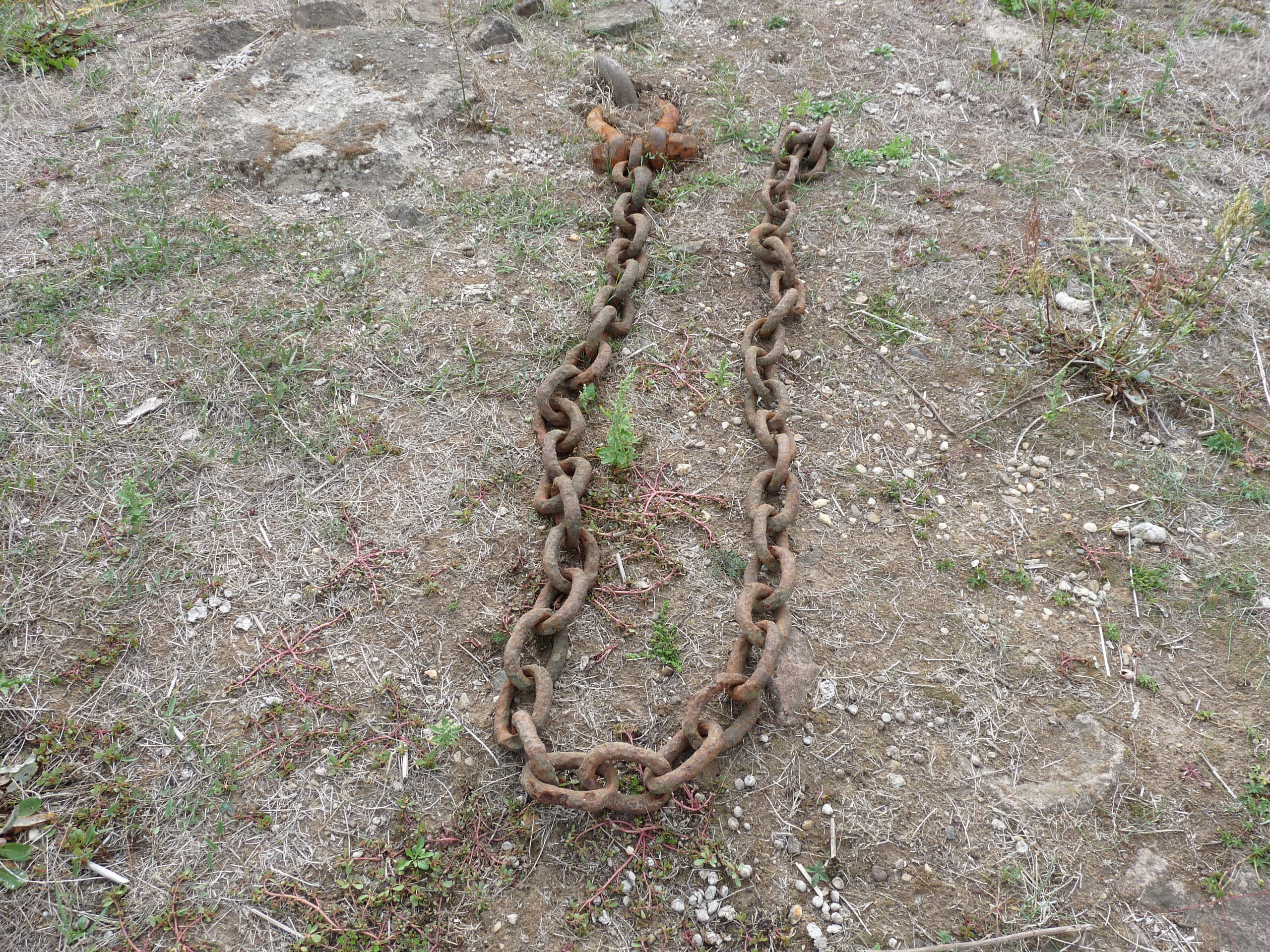 Fest in der Böschung des Ostufers der Elbe verankerte Kettenreste. Sie liegen etwa am Kilometer 371,45 der Elbe nahe der Einmündung des Pareyer Verbindungskanals und dienten früher der antriebslosen Schifffahrt zum Festmachen und als Hilfestellung bei der Einfahrt in den elbseitigen Schleusenkanal der Schleuse Parey.